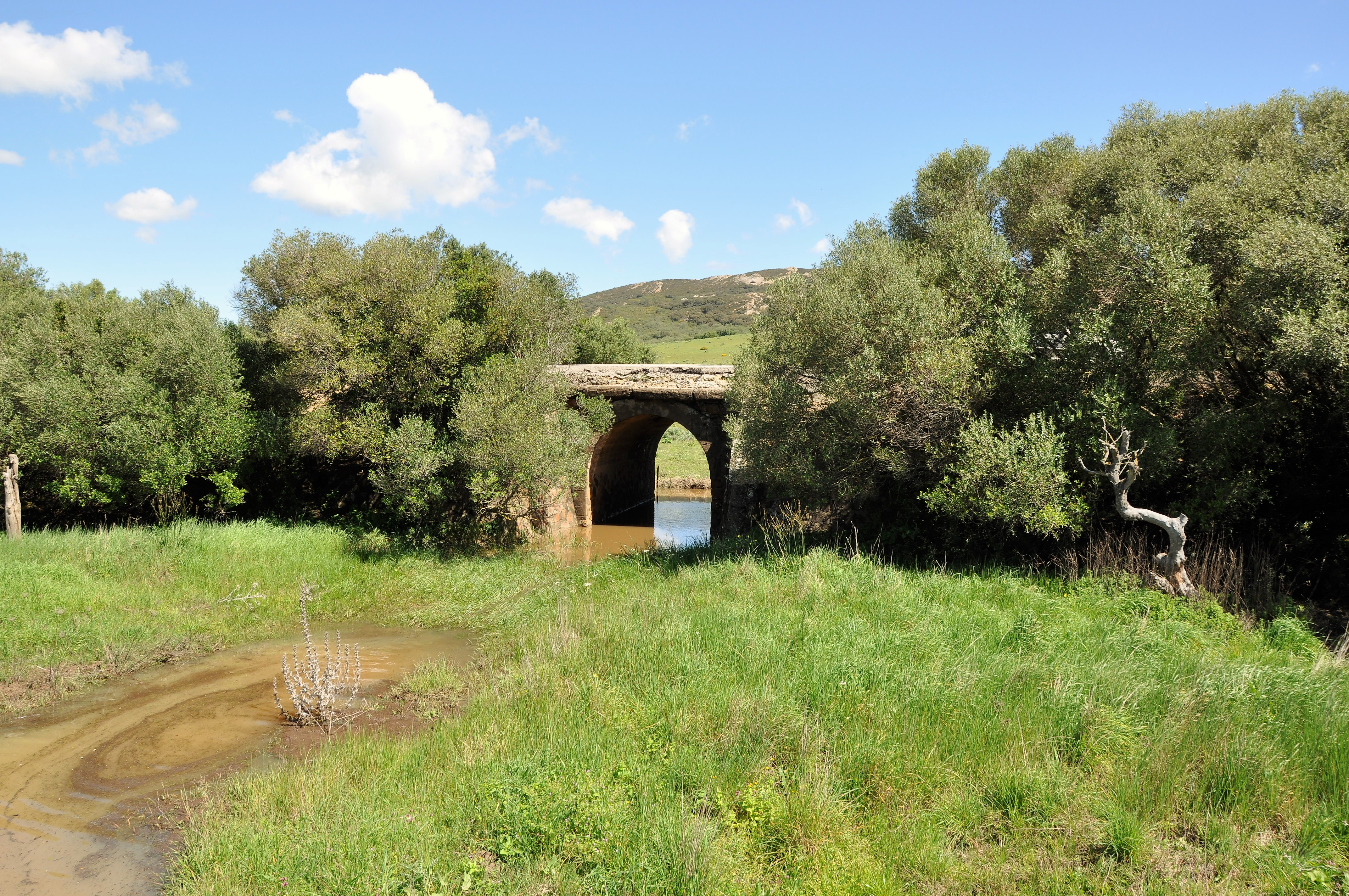 Puente y acebuches (Olea europaea var. sylvestris) en el corredor de las dos bahias, Benalup, Cadiz, España This is a photography of a Special Area of Conservation in Spain with the ID: ES0000049. Natura2000 entry, EEA entry